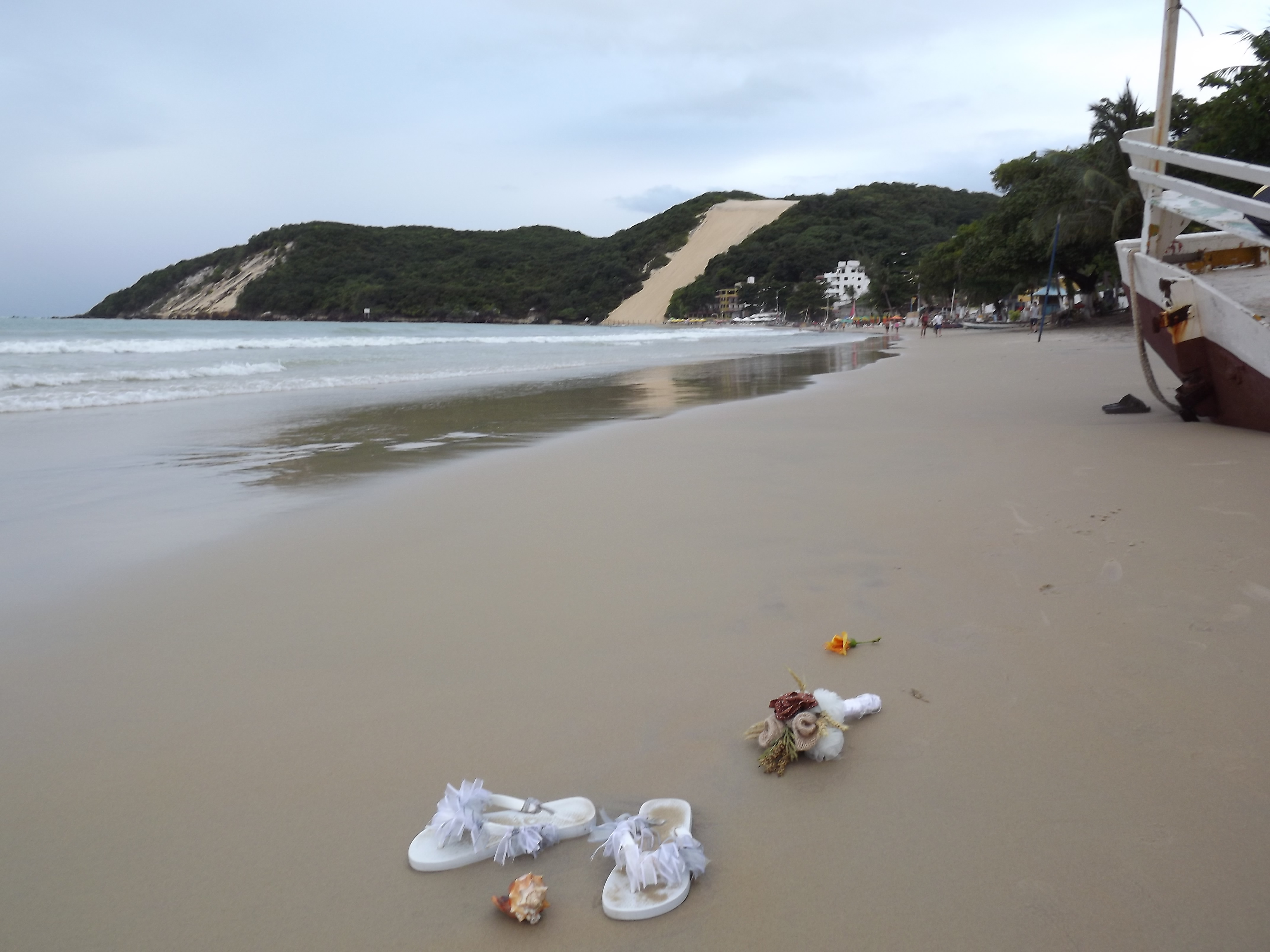 Parazinho - State of Rio Grande do Norte, Brazil